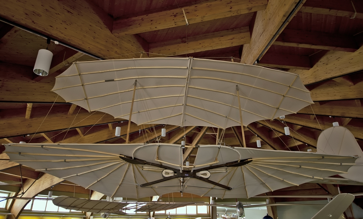 Lilienthal Standard Doppeldecker - 1895 Nachbau